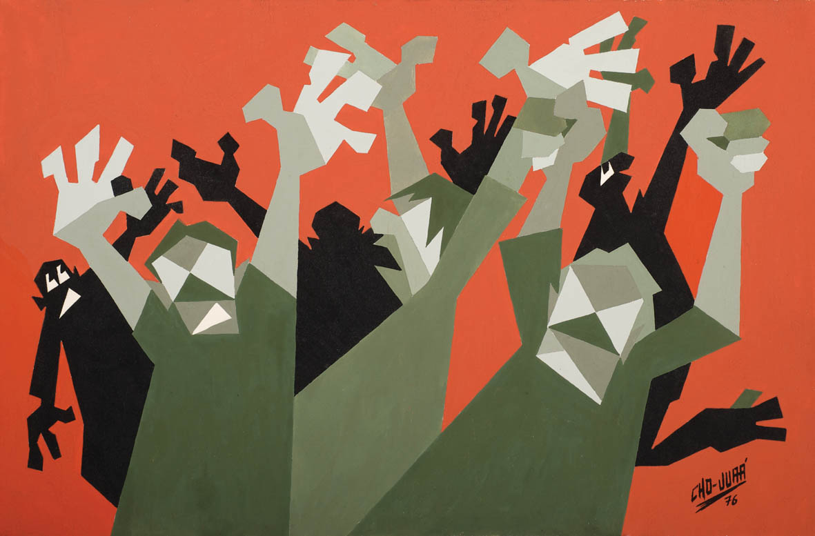 SIn Título 2